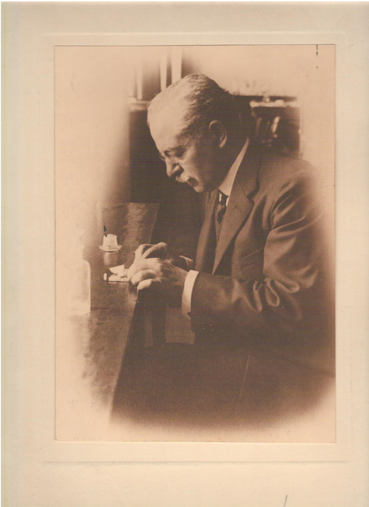 Dimitrie Calugareanu, fiziolog român